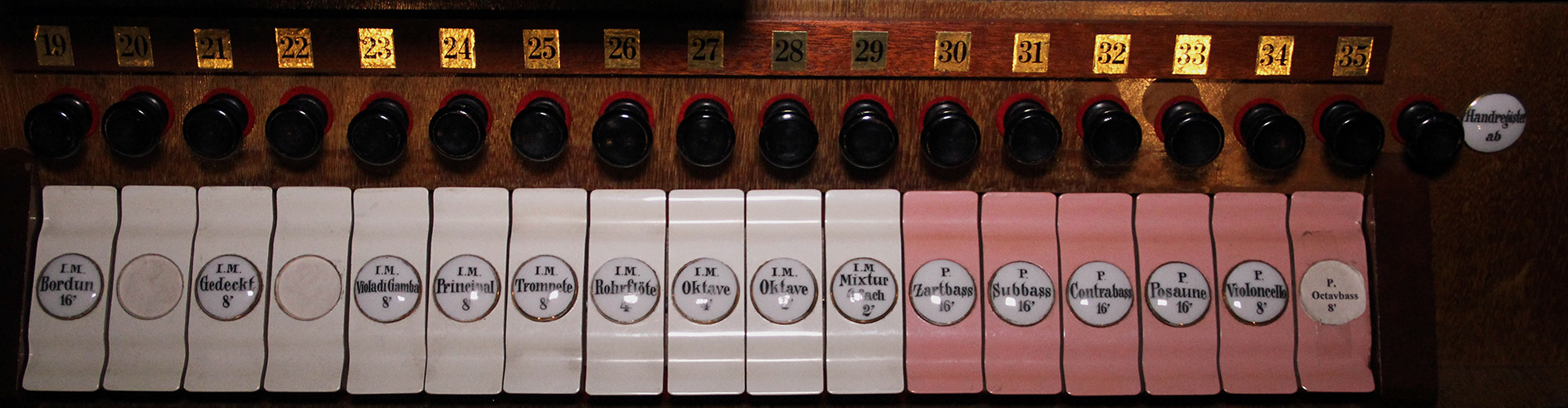 Manubrien des Haupt- und des Pedalwerks am Spieltisch der Strebel-Orgel in der Stadtkirche St. Marien Gräfenthal